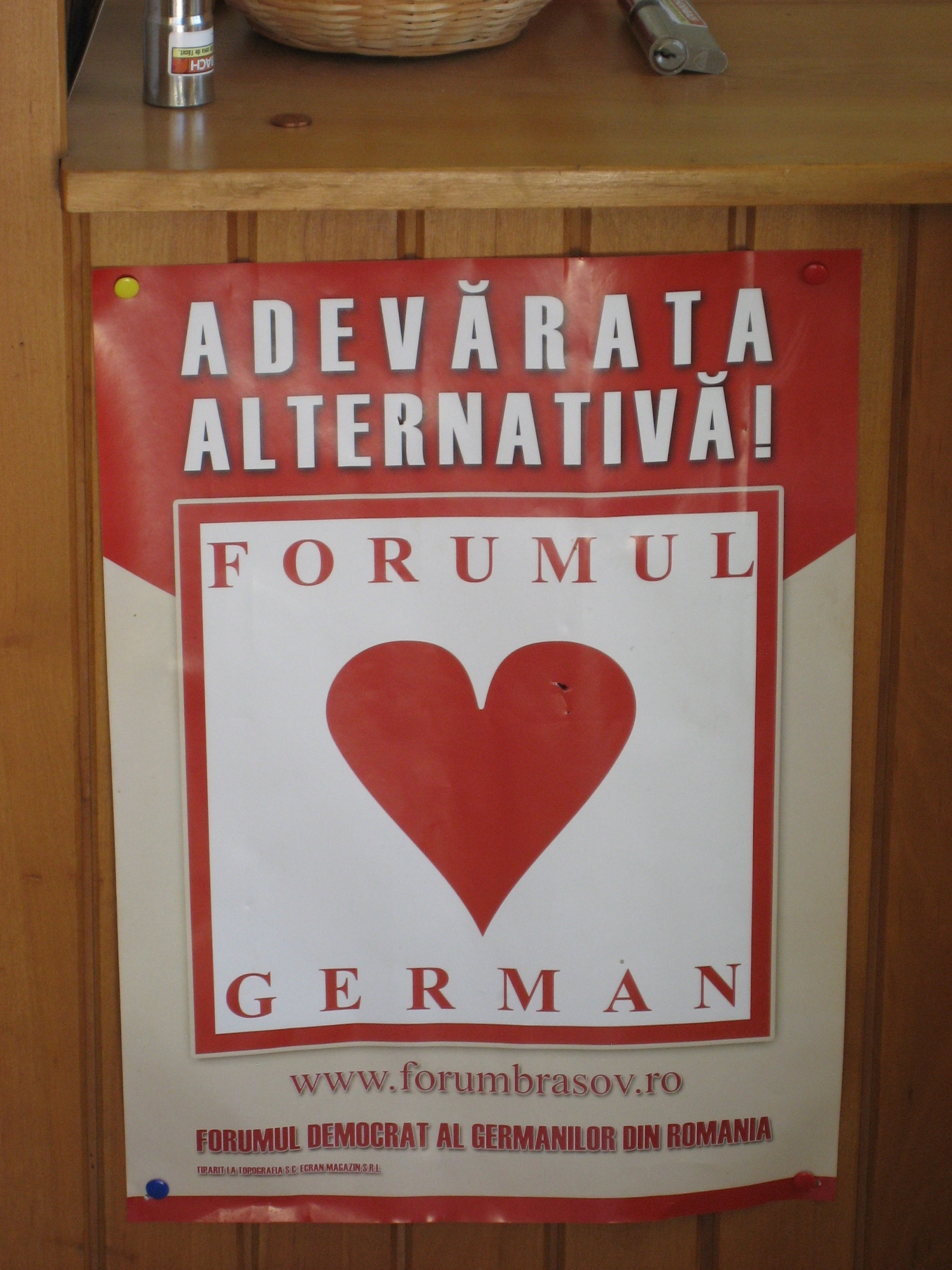 Wahlplakat des Demokratischen Forums der Deutschen in Rumänien, Abteilung Kronstadt/Braşov. Text: Adevărata Alternativă! Forumul German = Die wahre Alternative! Das deutsche Forum.